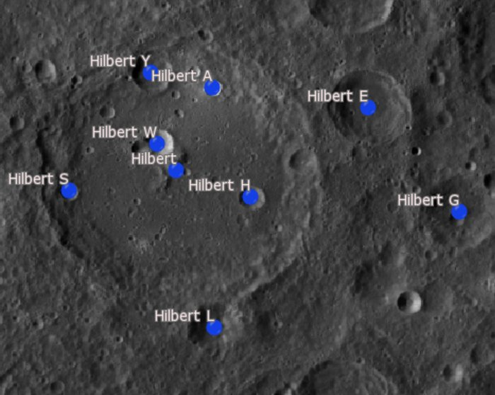 Cráter lunar Hilbert. Cráteres satélite. (Imagen LRO)